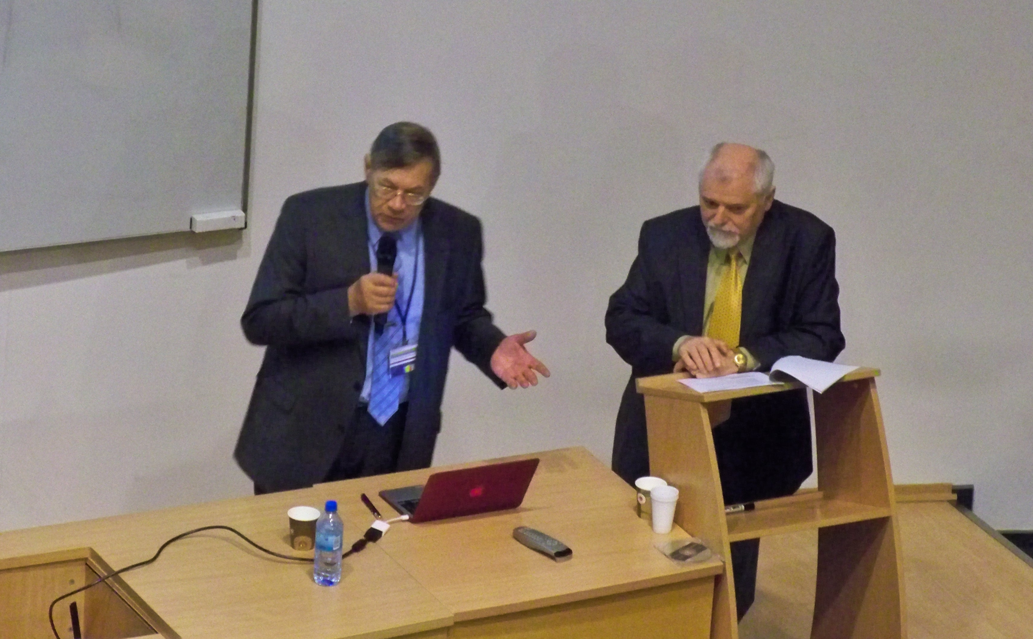 Profesorowie Ryszard Chróst (z lewej) i Marcin Pliński na XXII Zjeździe Hydrobiologów Polskich w Krakowie w 2012 r.